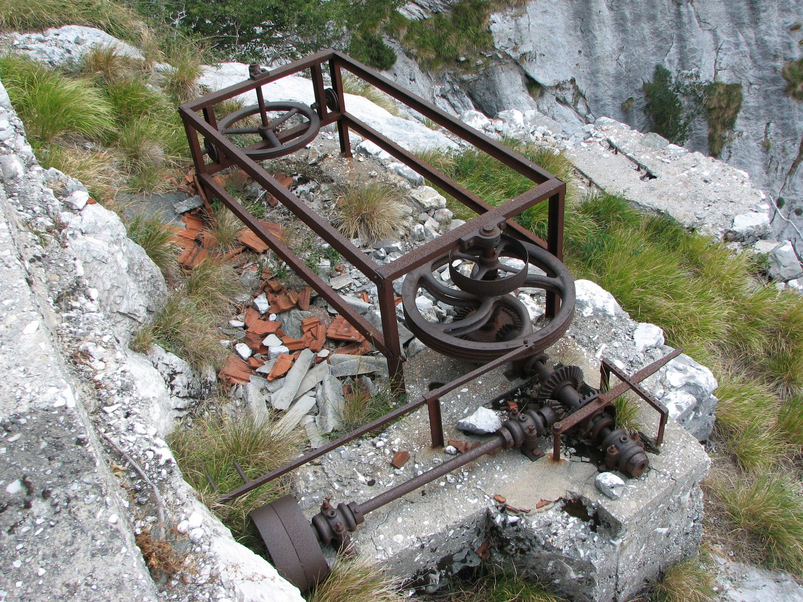 Macchinari all'esterno del vecchio ricovero dei cavatori (1070), Toscana - Italia